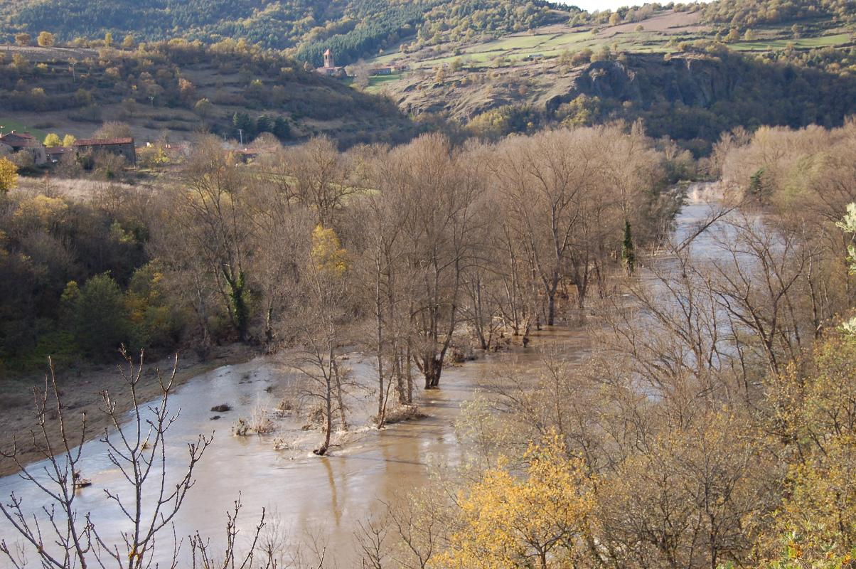 Prise de vue depuis la rive droite de l'Allier (vers le Chambon) de l'église de Blassac juchée sur son promontoire La magistrale crue de l'Allier et un belle lumière d'automne sont deux éléments de mise en valeur de ce paysage.